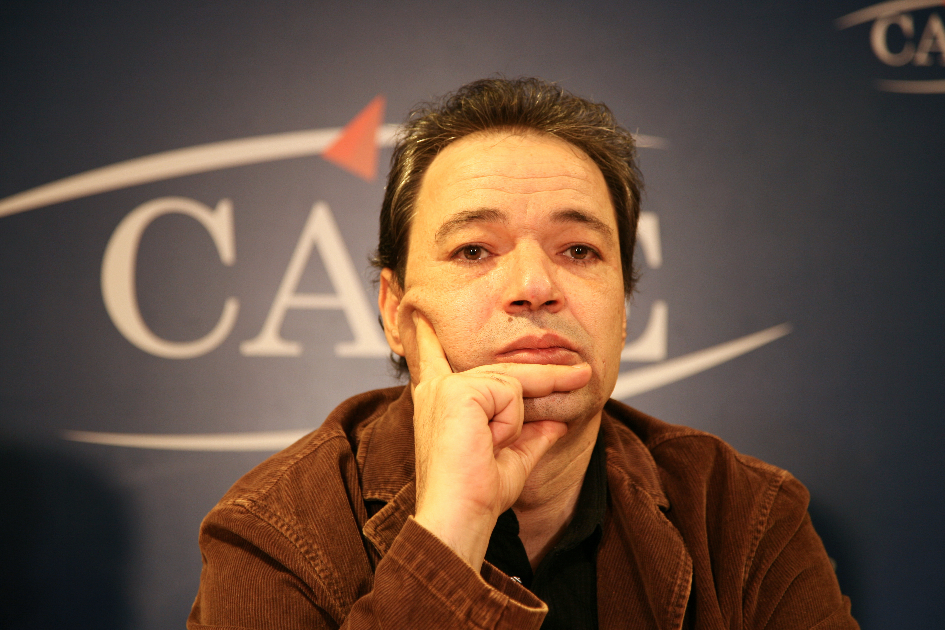 Conférence de Presse CAP PARIS - 06/2009 / Soheib Bencheikh présente son dernier livre: Les Versets Douloureux - Ed. Lessius (Bruxelles)